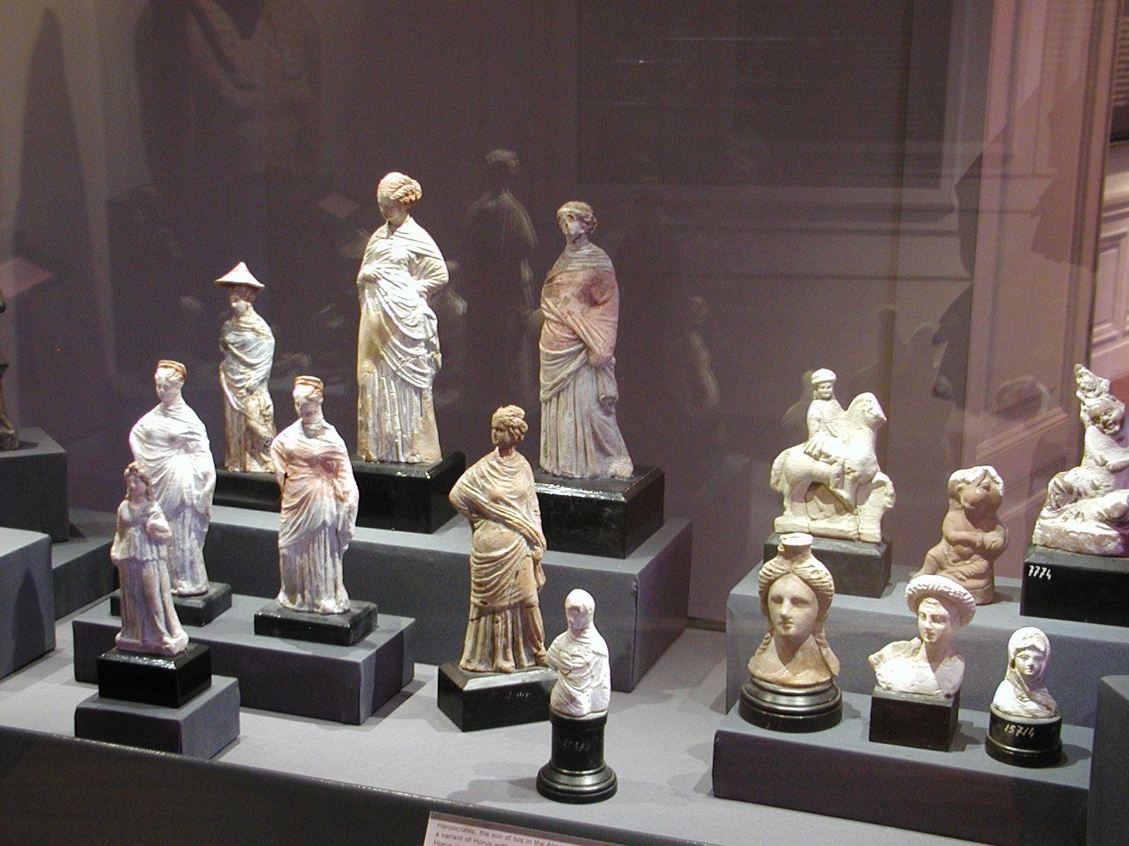 Collection de statuettes du type dit "de Tanagra", Musée national, Alexandrie, Égypte).